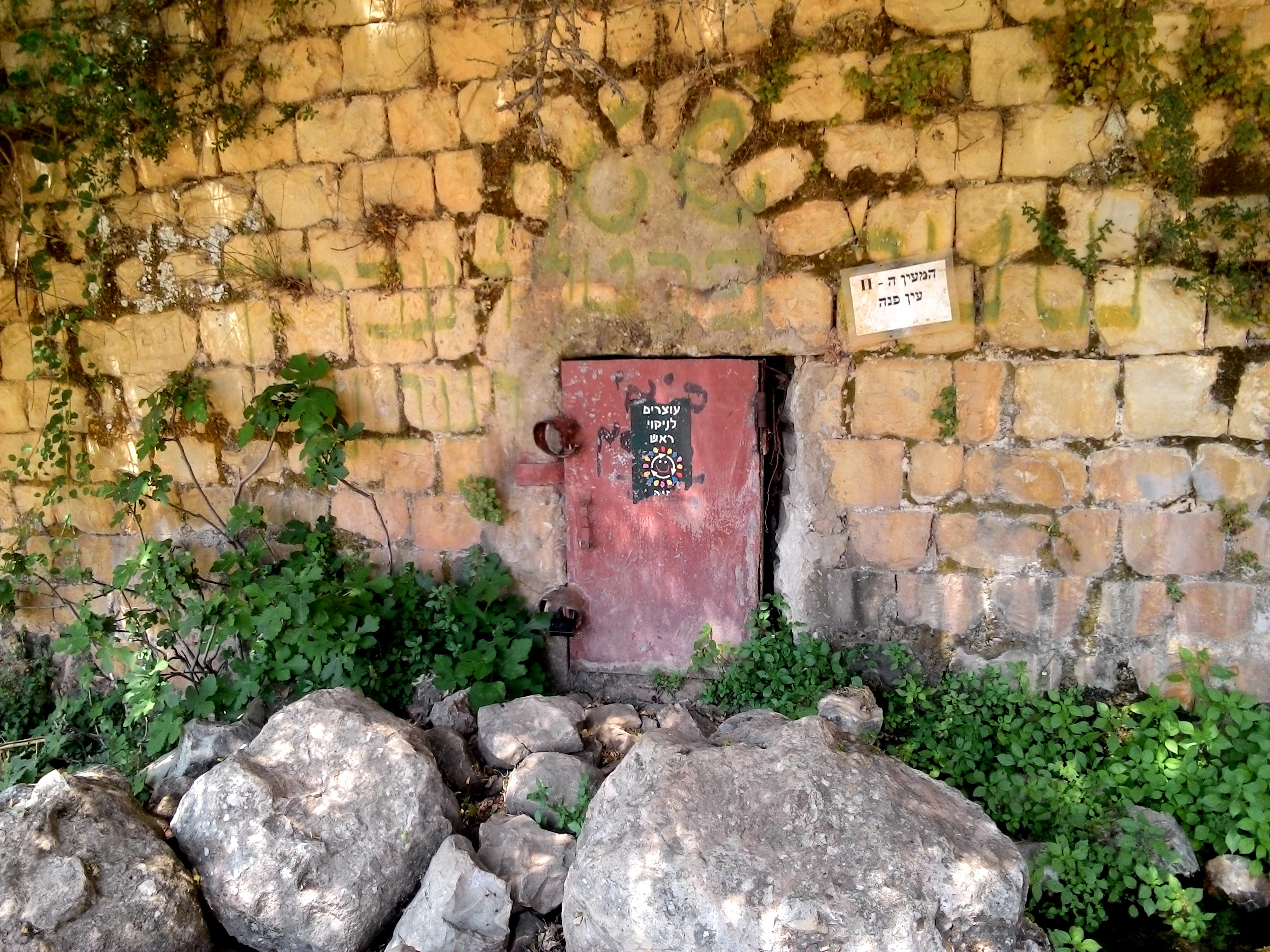 מעין פינה-צילם מתן ממן